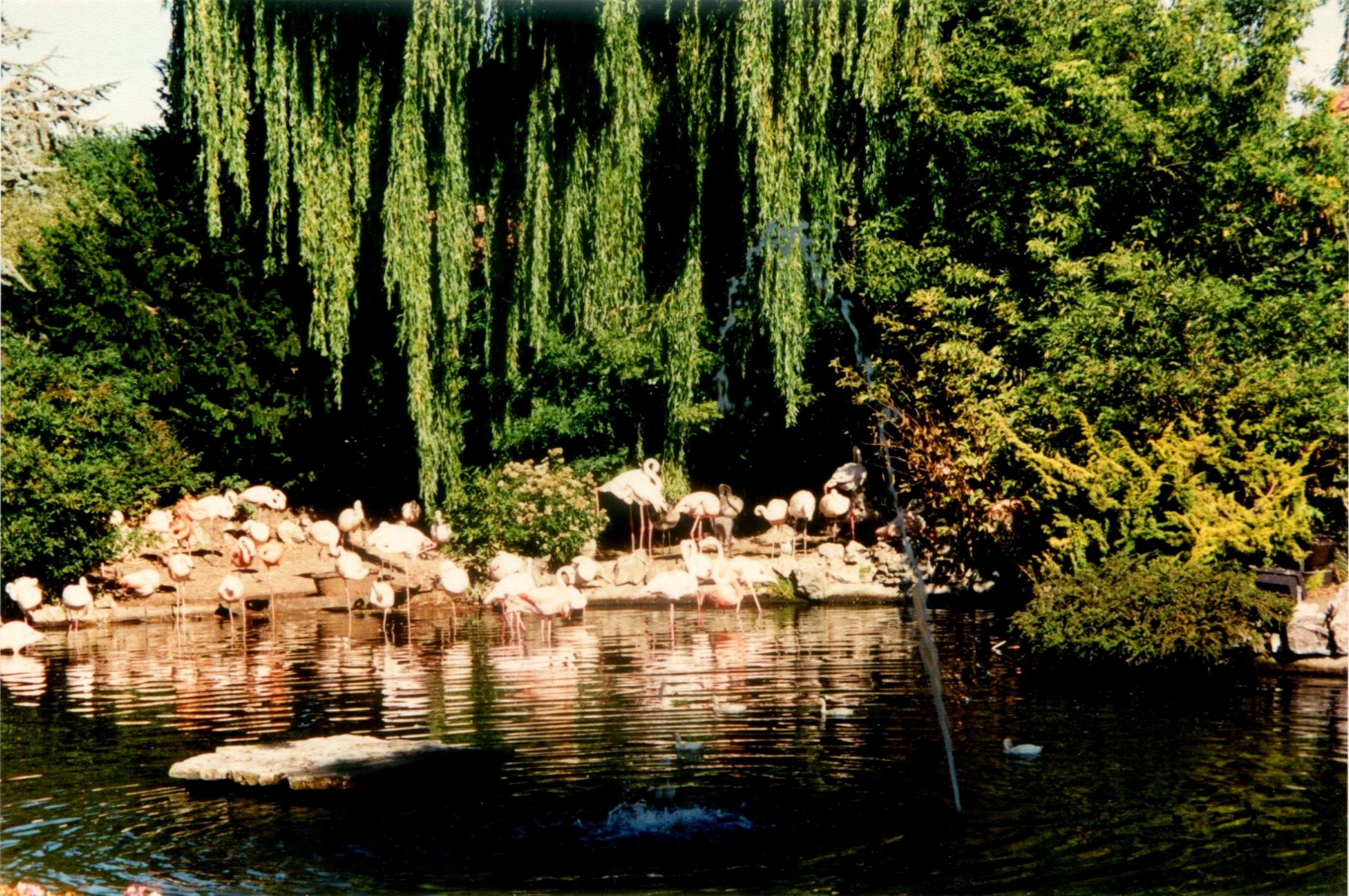 MeliparkBassinFlamandRose